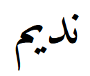 надим